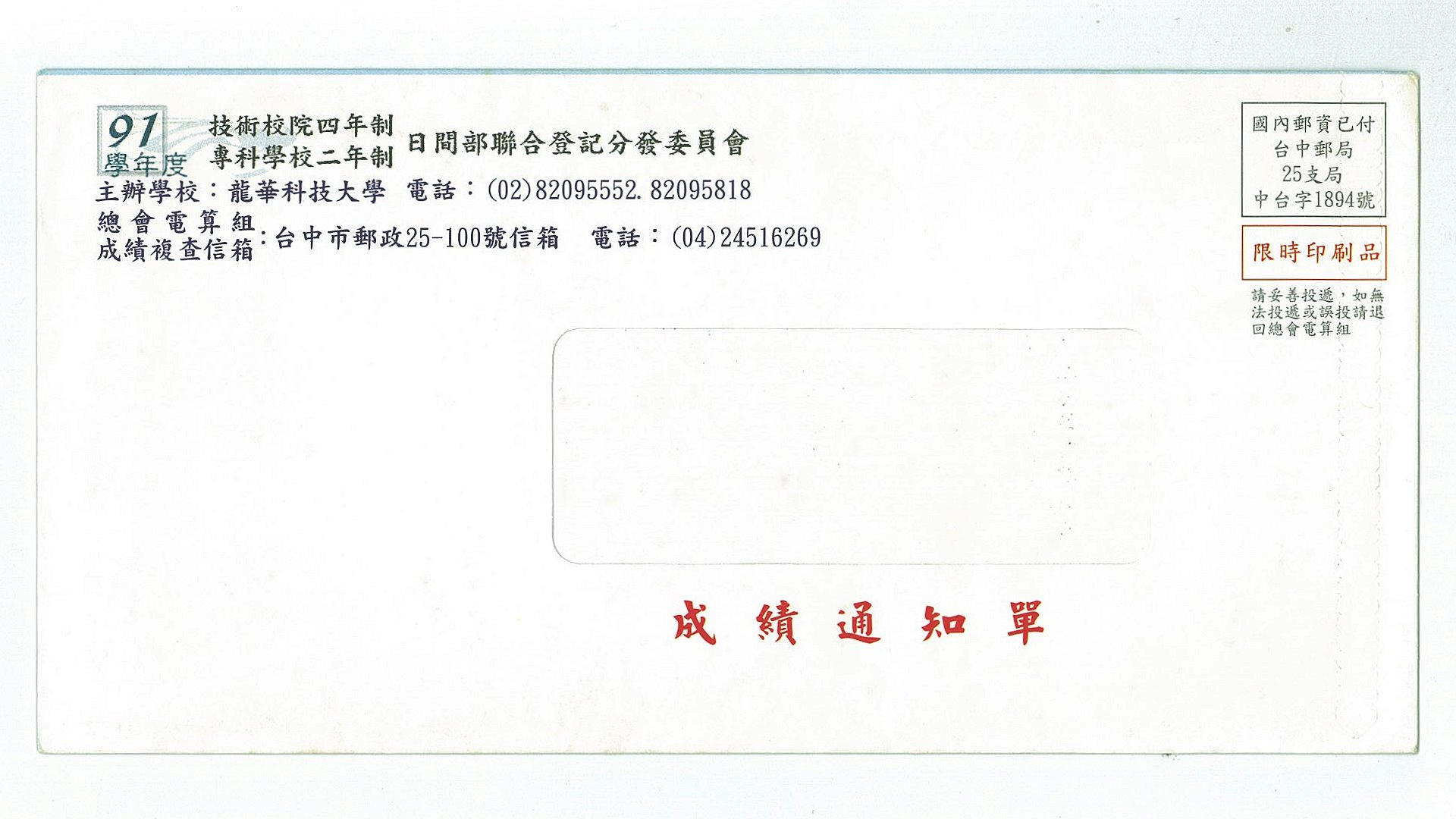 中華民國91學年度技術校院四年制及專科學校二年制日間部聯合登記分發委員會成績通知單信封，主辦學校為龍華科技大學。